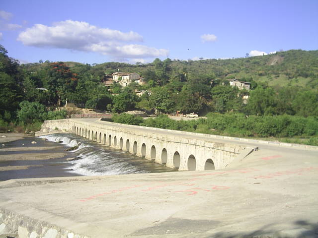 Puente antiguo del Río de Telpaneca.